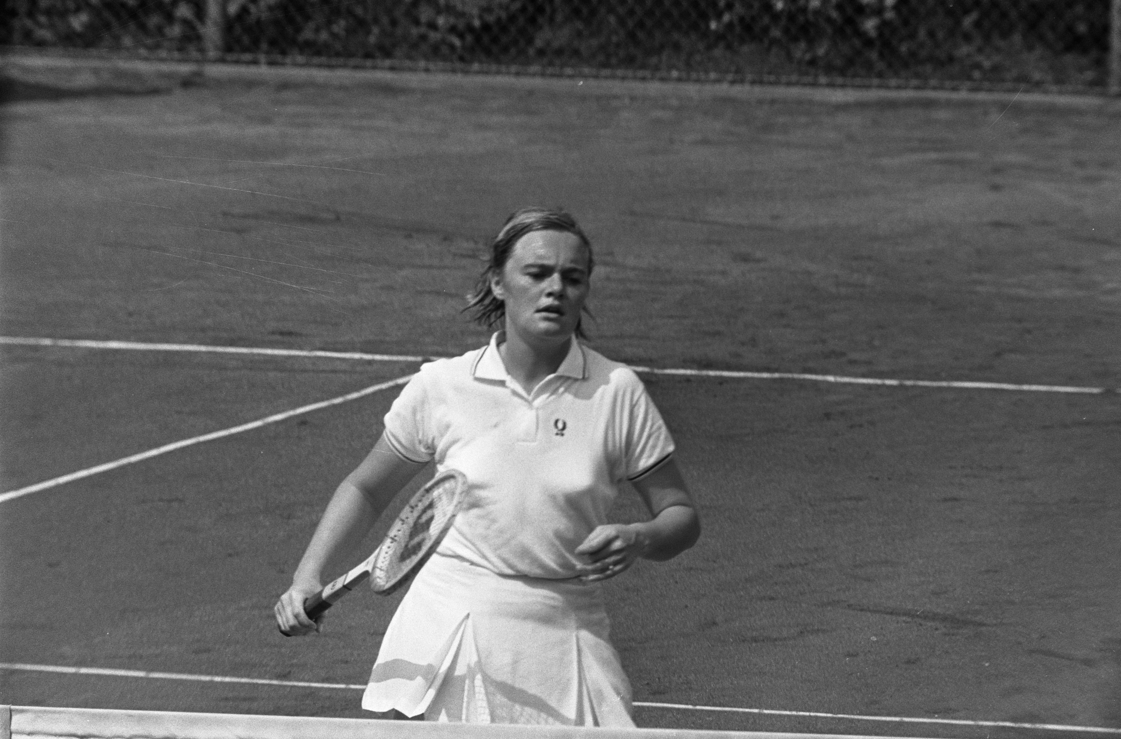 Collectie / Archief : Fotocollectie Anefo Reportage / Serie : [ onbekend ] Beschrijving : Internationale tenniskampioenschappen in Hilversum ( 't Melkhuisje ); Ada Bakker in aktie Datum : 29 juli 1970 Locatie : Hilversum Trefwoorden : sport, tennis Persoonsnaam : Bakker Ada Instellingsnaam : Melkhuisje, 't Fotograaf : Koch, Eric / Anefo Auteursrechthebbende : Nationaal Archief Materiaalsoort : Negatief (zwart/wit) Nummer archiefinventaris : bekijk toegang 2.24.01.05 Bestanddeelnummer : 923-7124